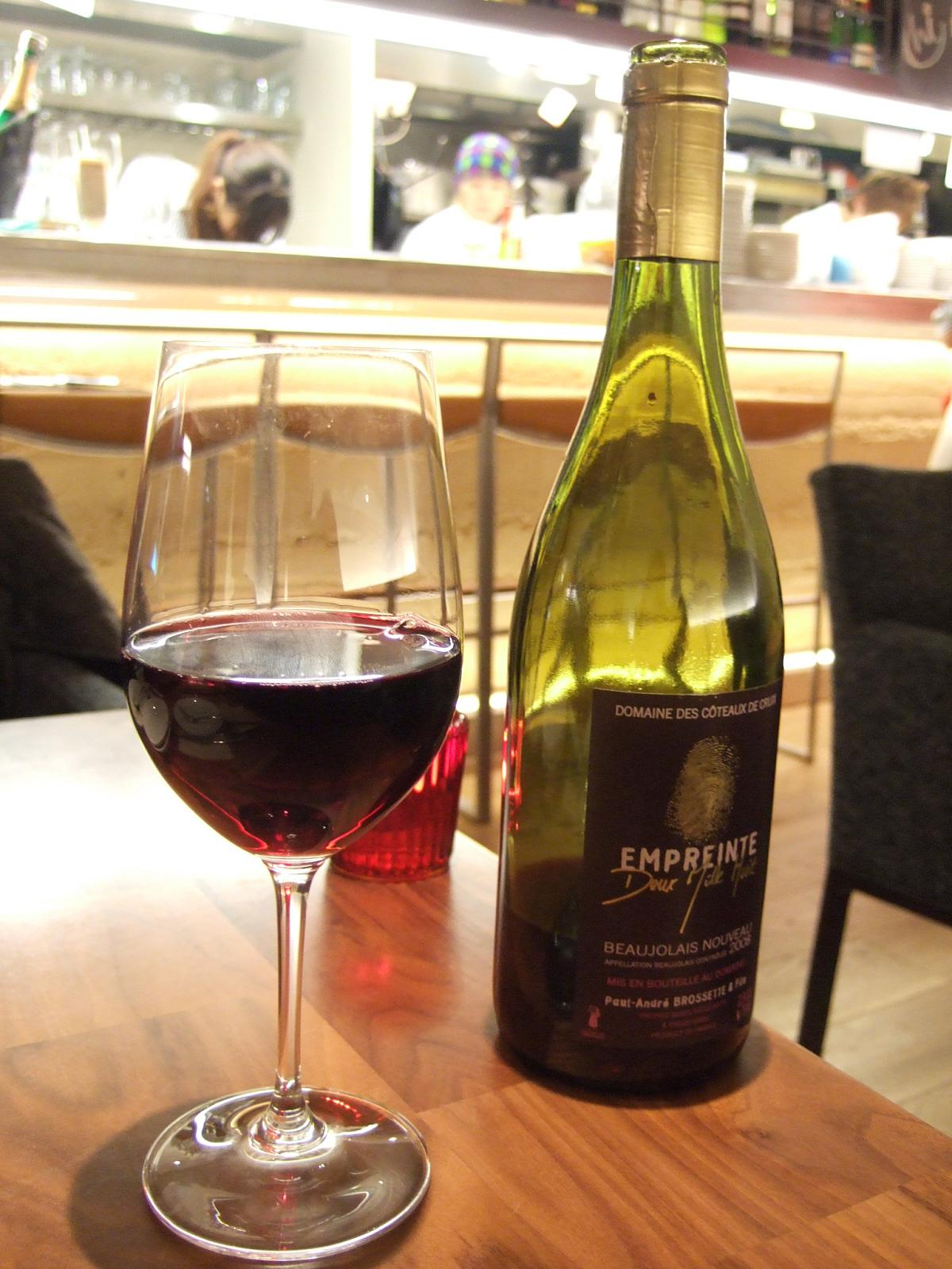 From author: "Domaine des Coteaux de Cruix EMPREINTE(アンプレント) Beaujolais Nouveau 2008 (ボジョレー・ヌーヴォー 2008) Paul-Andre BROSETTE et Fils"